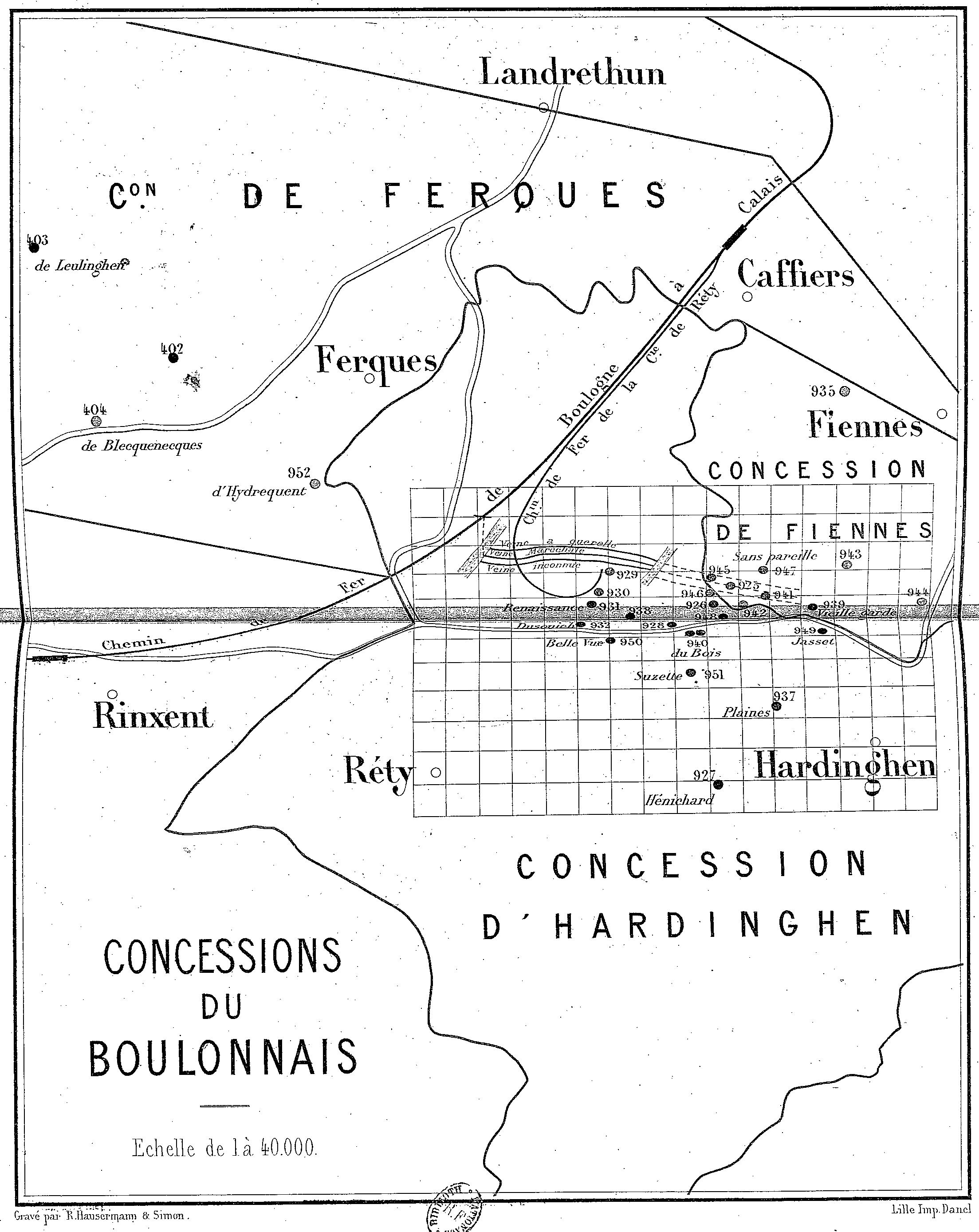 État des travaux de la Compagnie des Charbonnages de Réty, Ferques et Hardinghen vers 1880.